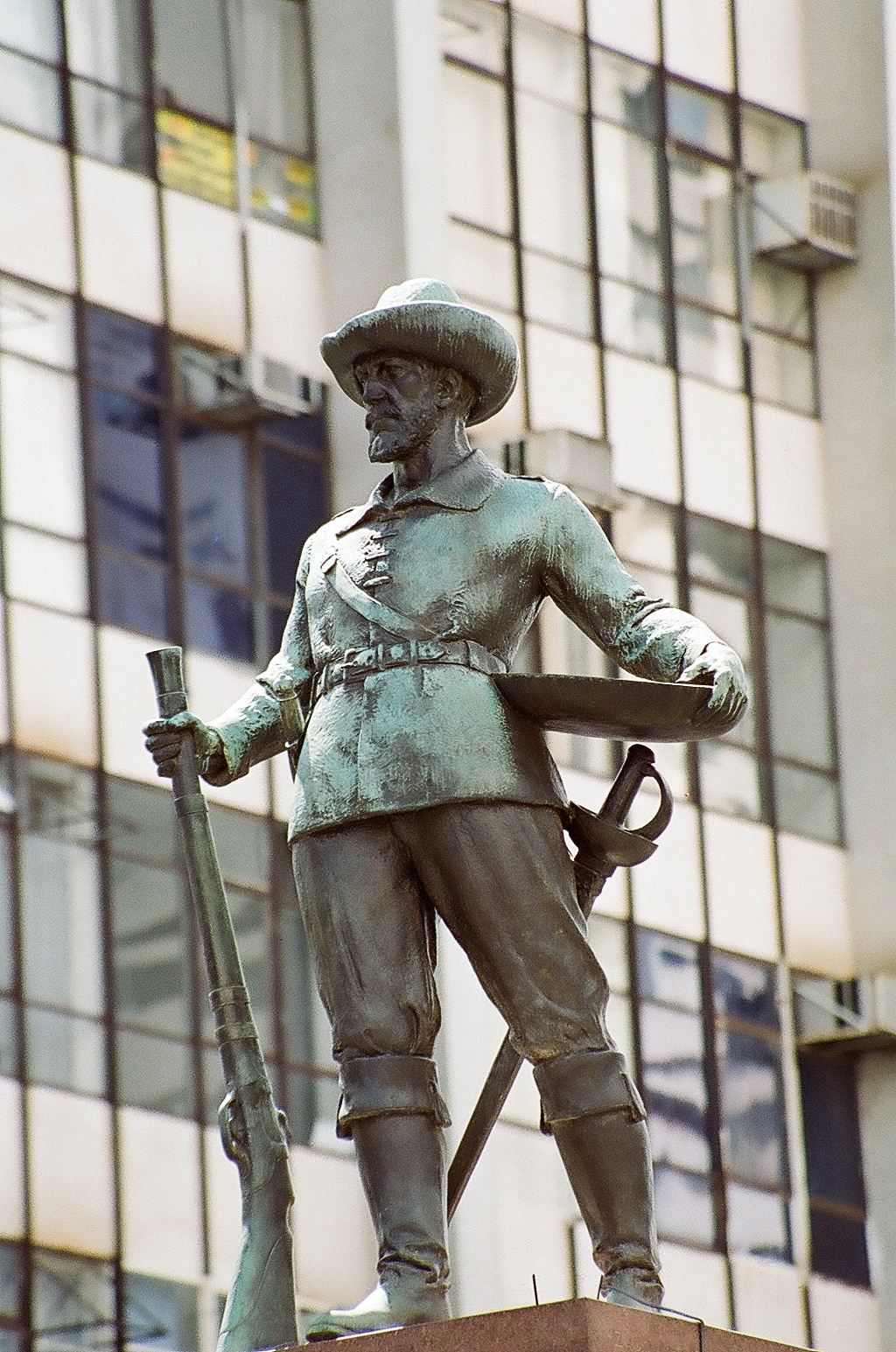 Momumento ao Bandeirante - Goiânia - Goiás - Brasil